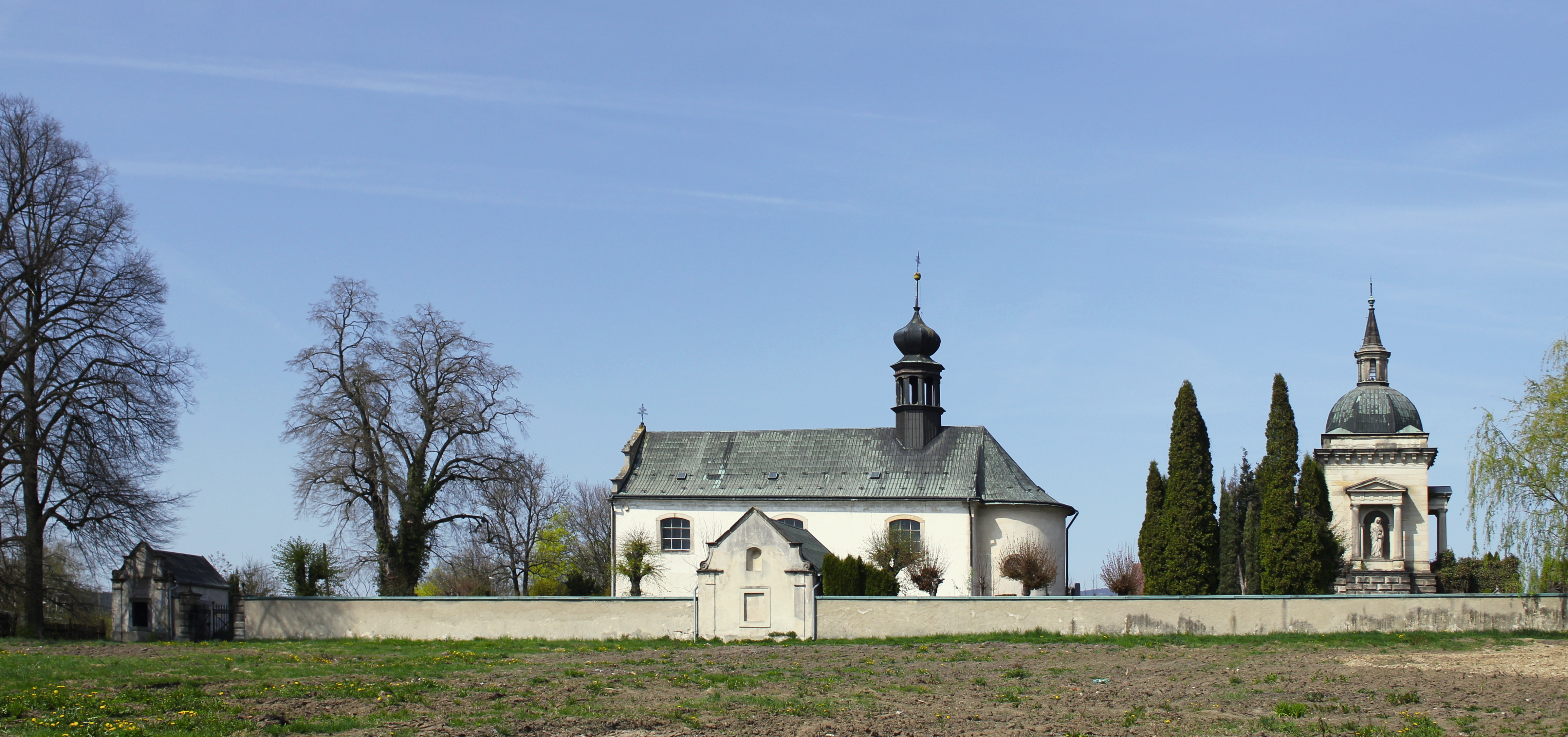 Hřbitovní kostel Nejsvětější trojice a hrobka rodiny Schmittů, Český Dub